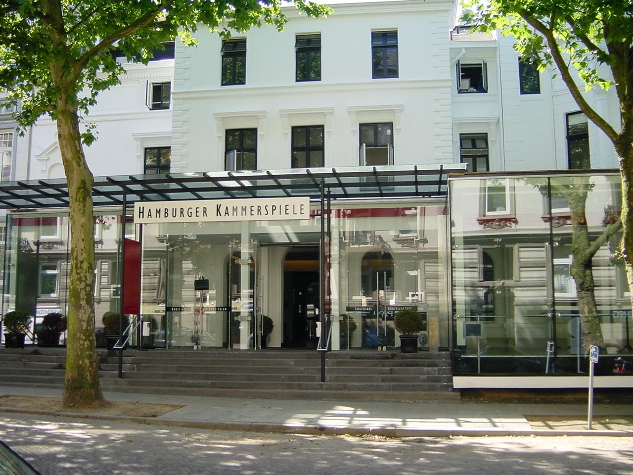 Hamburger Kammerspiele / Stäitsch Theaterbetriebs GmbH